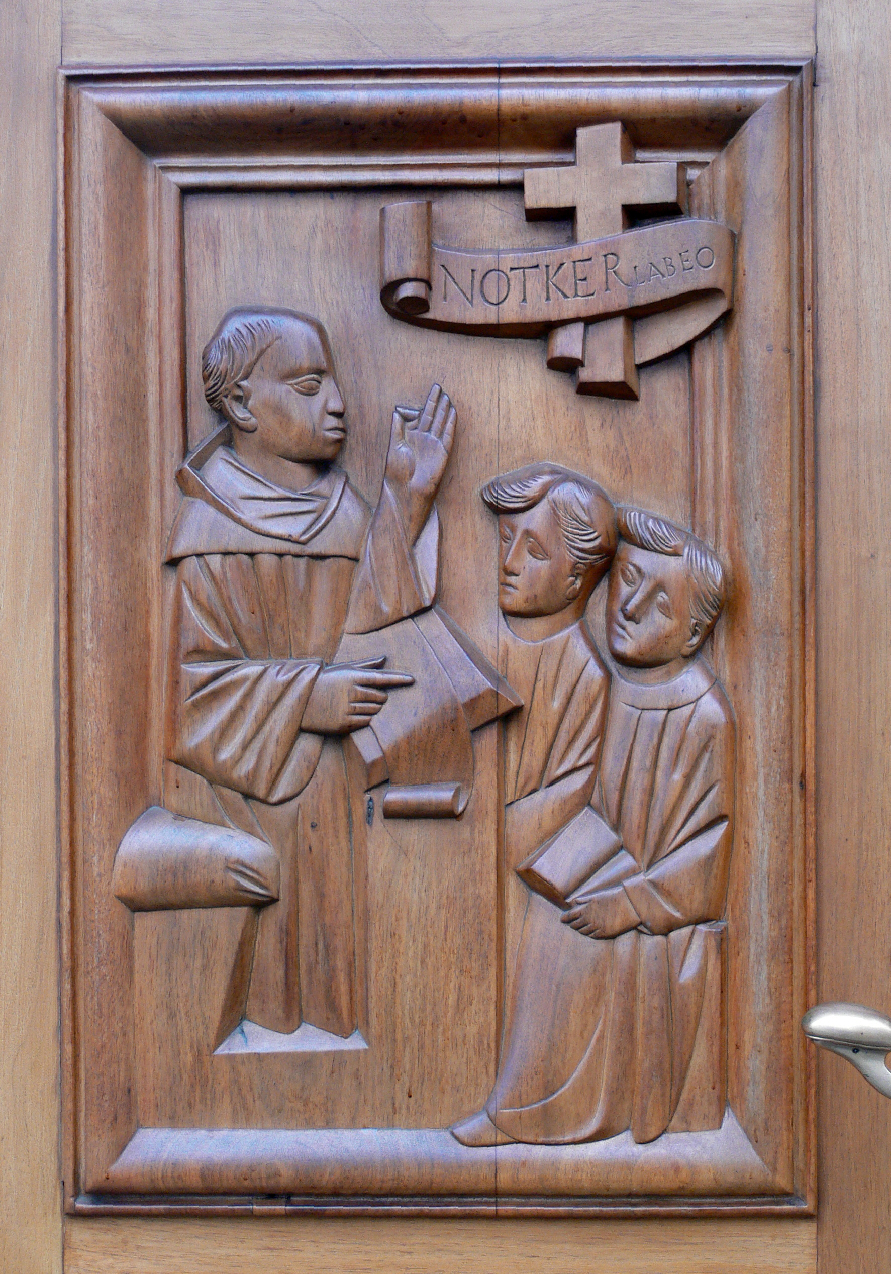 Stiftskirche St. Gallen, Schweiz Portal, Relief: Notker Labeo